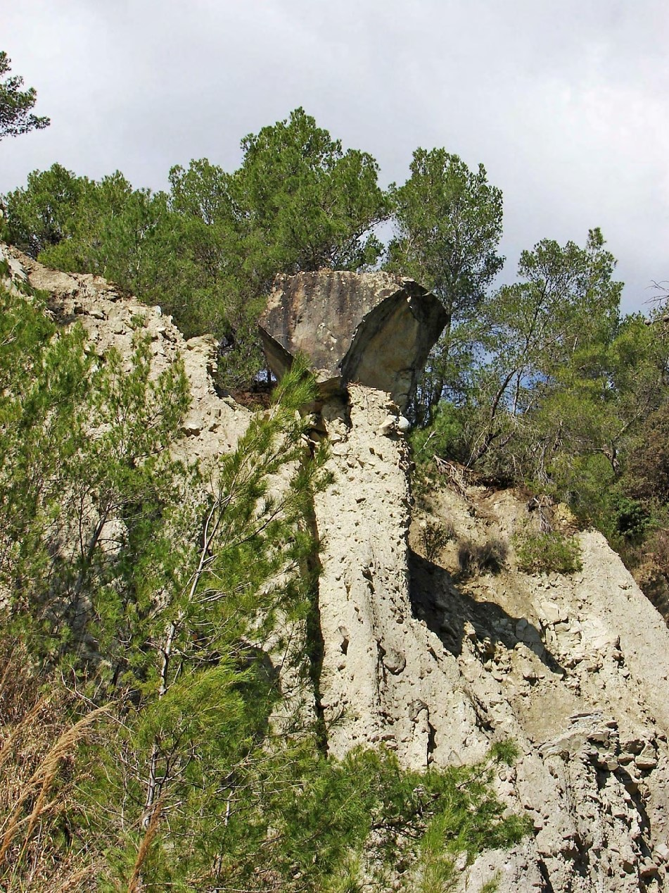 L'Armo di Mastroromano - Albidona